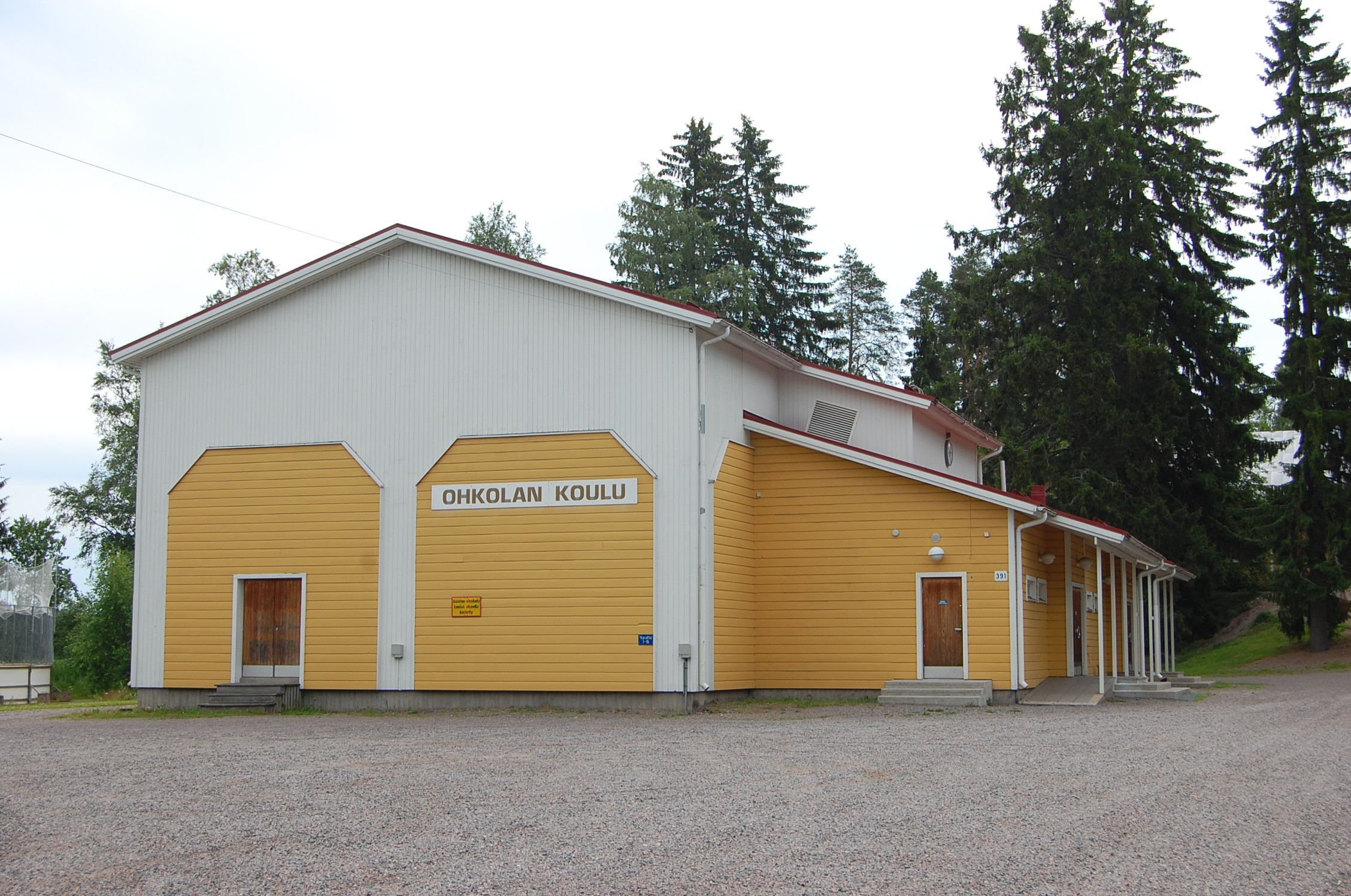 Ohkolan koulun vuonna 1989 rakennettu liikuntarakennus.